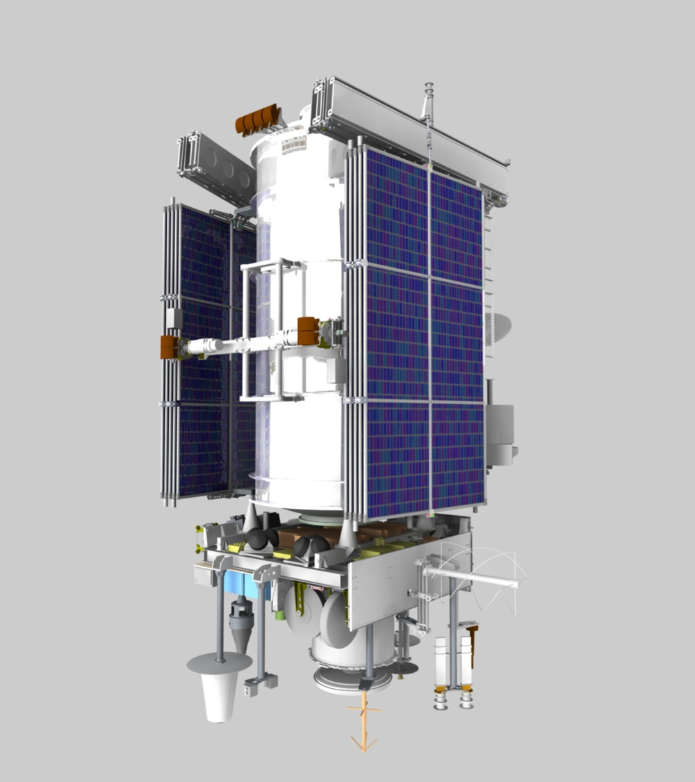 модель КА "Метеор-М"№1 на этапе выведения